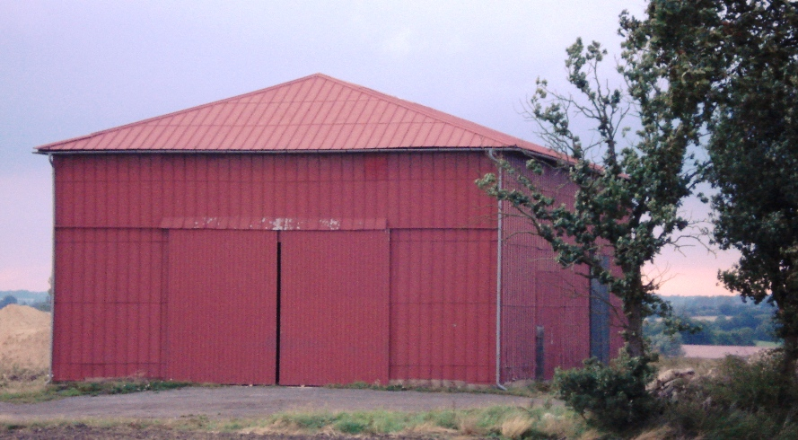 Die Sibliner Feldscheune bei Ahrensbök